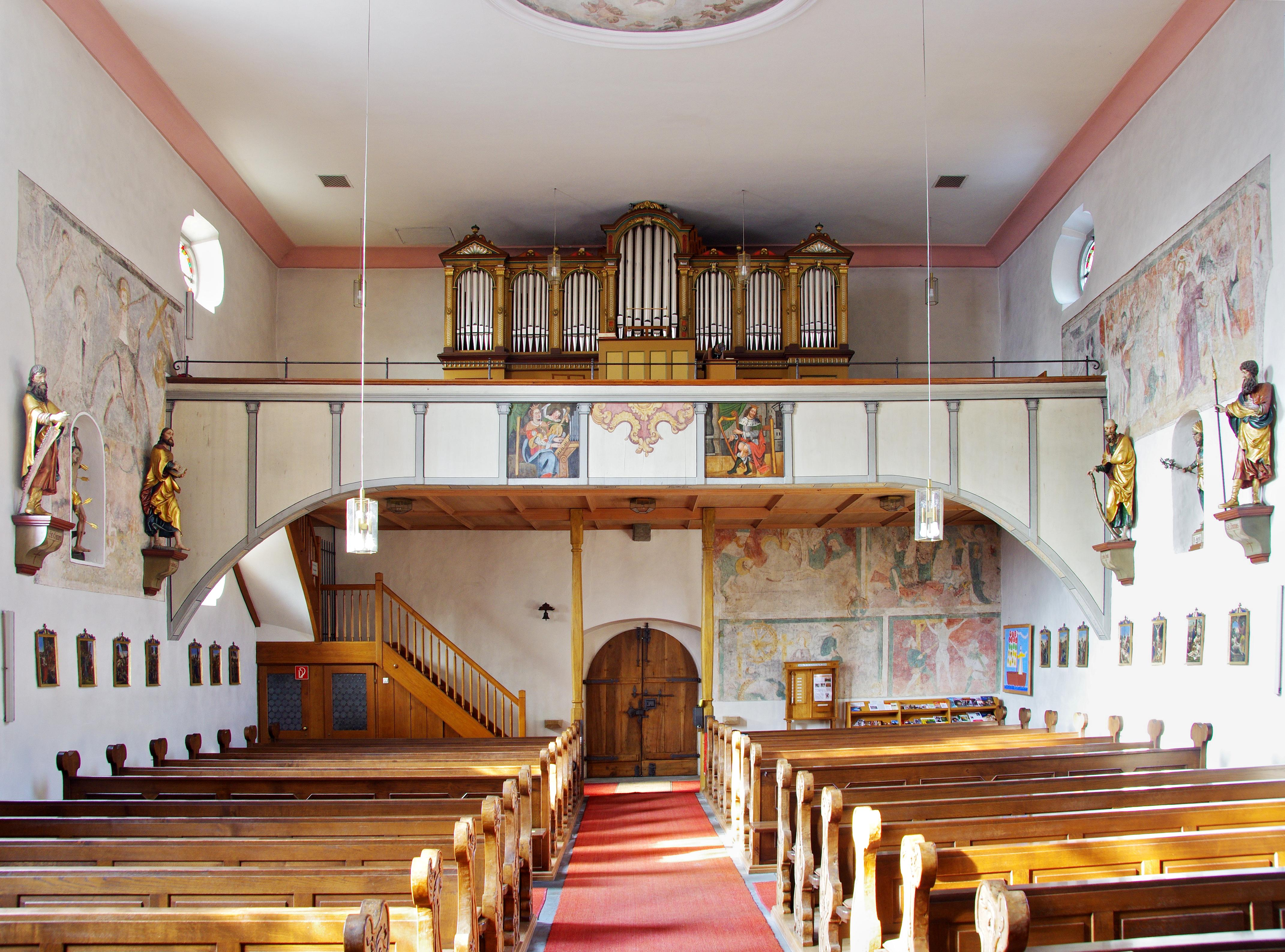 Eriskirch, Mariä Hilf, Blick zum Eingang und Orgel